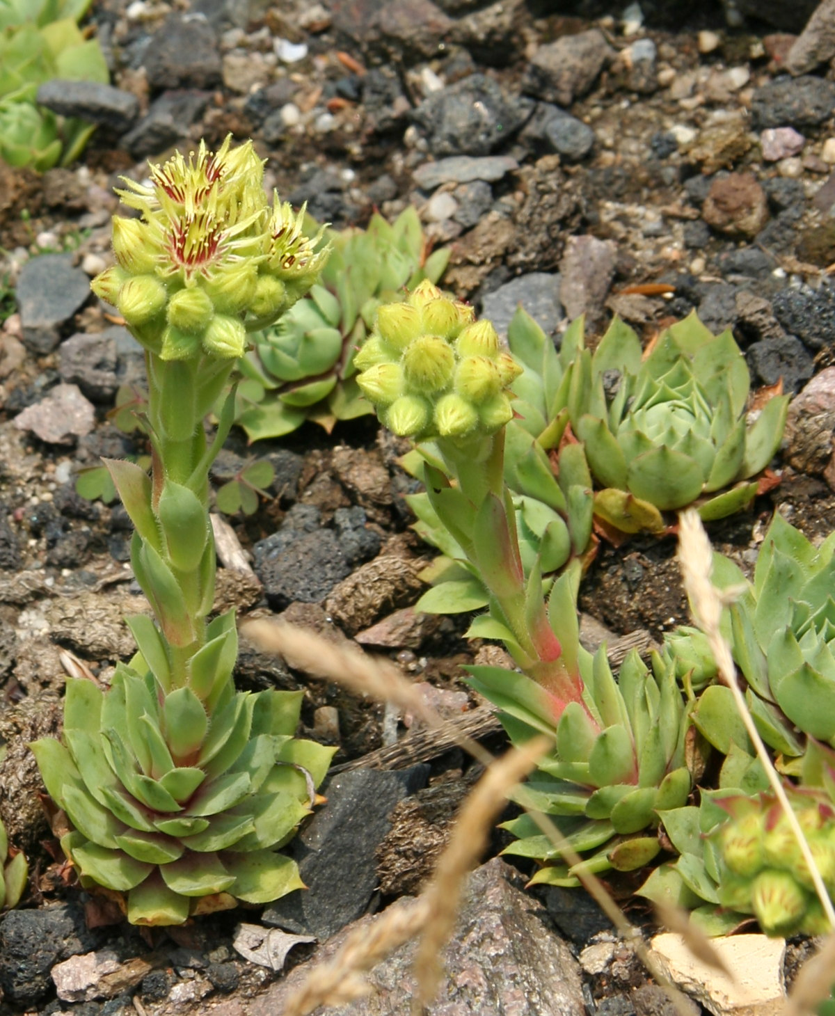 Sempervivum wulfenii im Botanischen Garten Dresden